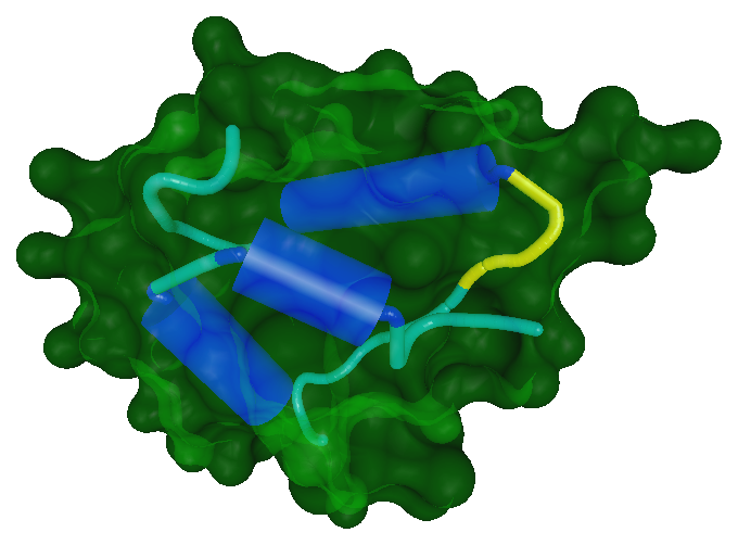 Insulinstruktur: SES und Sekundärstruktur Softwarewerkzeug: Die Struktur wurde von mir mit BALLVIEW generiert.